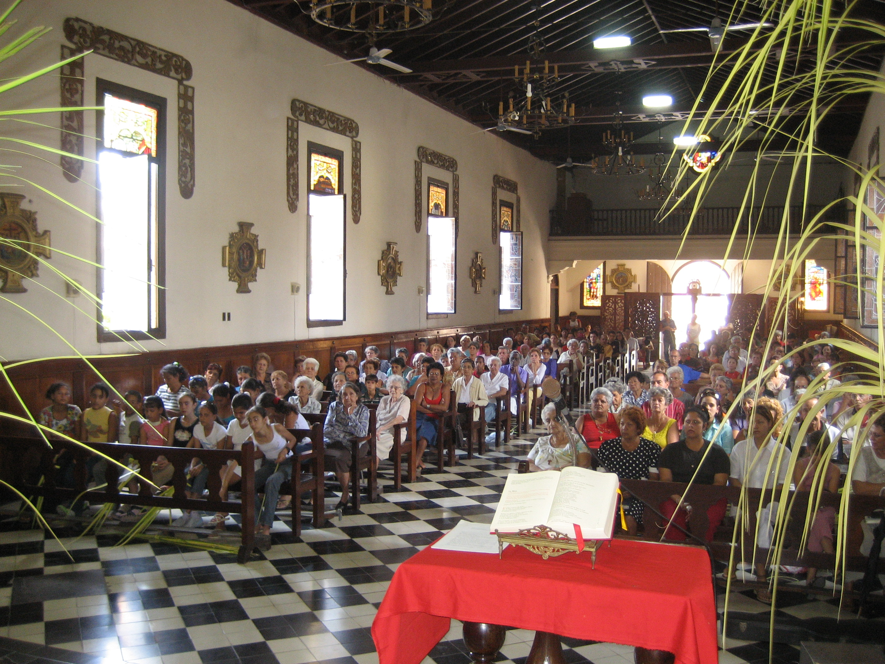 Cuba, Parroquia de San José de Jatibonico. Oficios del Domingo de Ramos de 2007, a las 10:30.